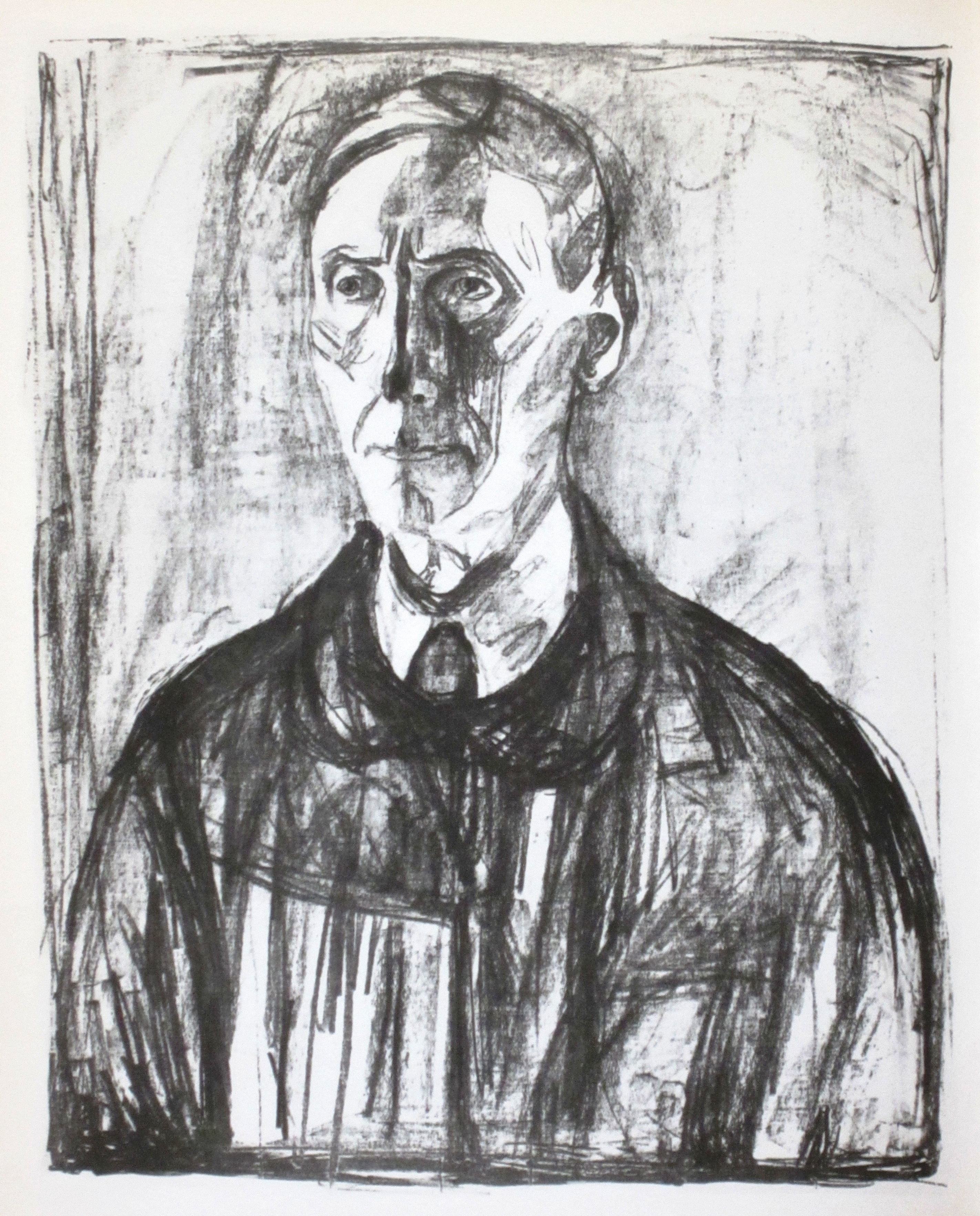 Porträt Professor Schreiner